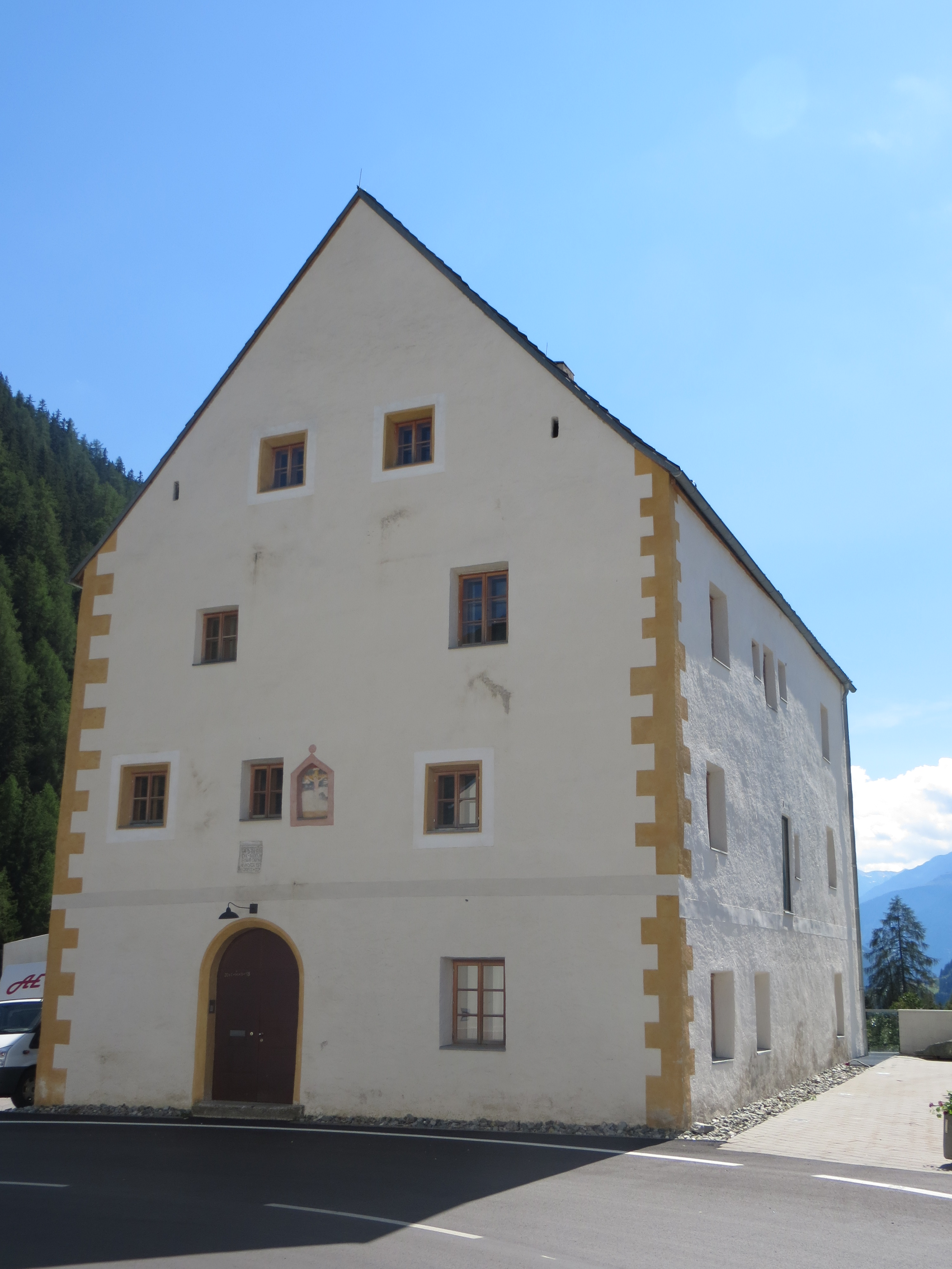 Widum Ködnitz, Gemeinde Kals am Großglockner